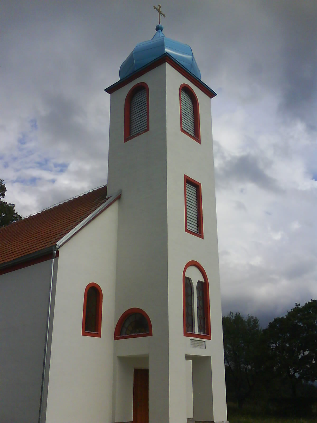 Slika crkve Uspenja Presvete Bogorodice u Vodjenici. Autor slike je Nenad Marković.